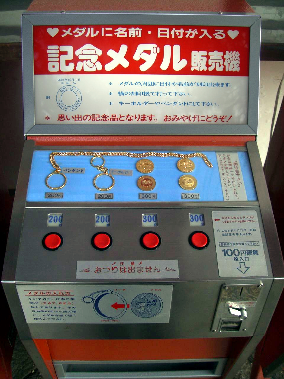 レトロな記念メダル製造機！@京都平安神宮